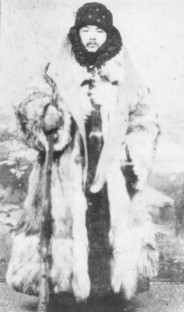 A Japanese journalist,玉井喜作（Kisaku Tamai）